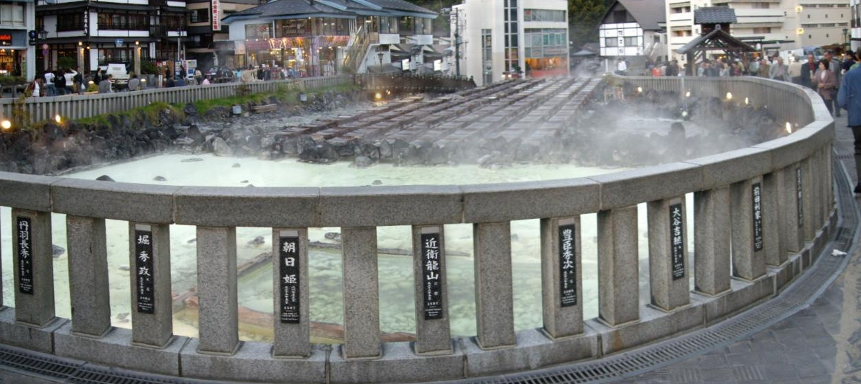 草津温泉の湯畑。